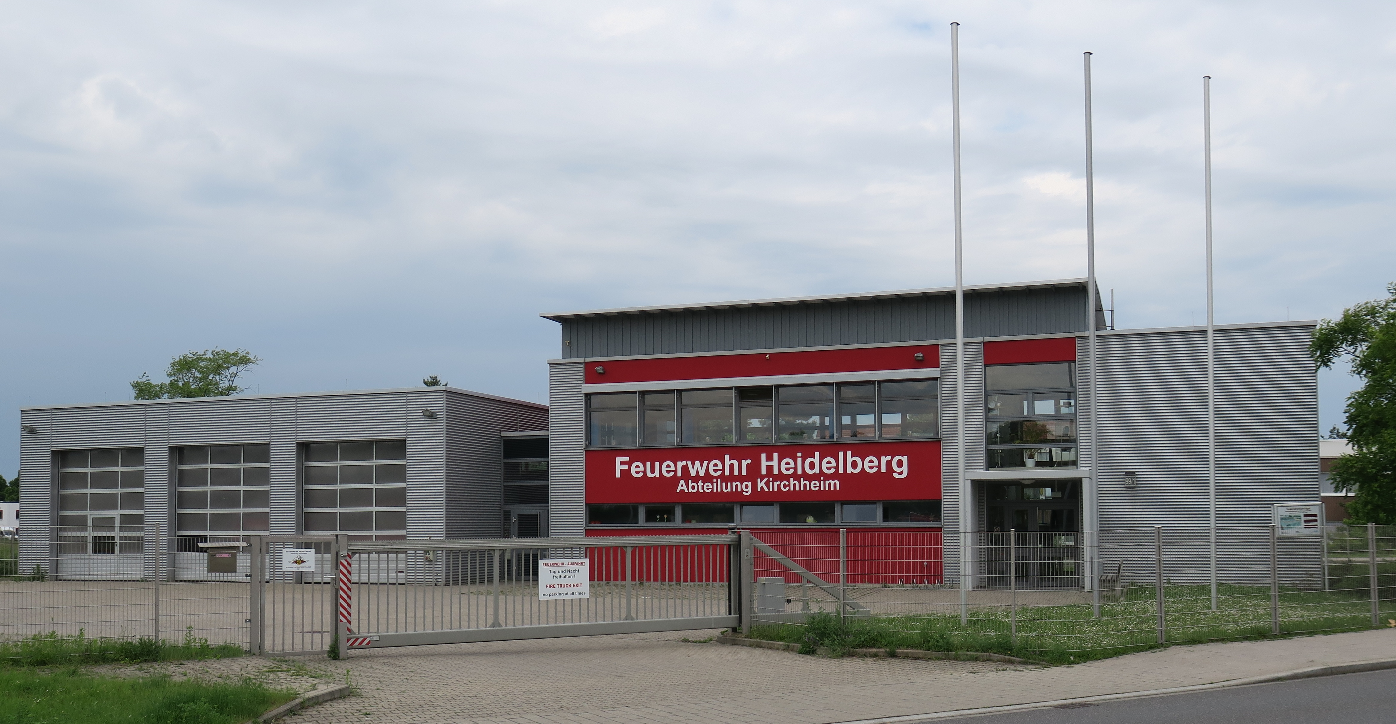 Feuerwehrhaus der Einsagtzabteilung Heidelberg-Kirchheim